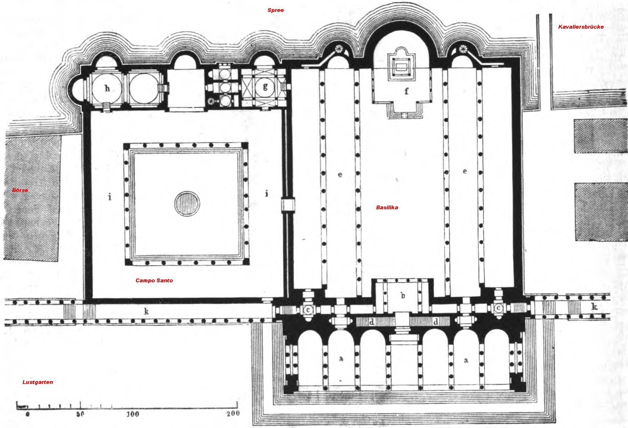 Finaler Entwurf des Architekten F. A. Stüler für einen Neubau des Berliner Domes.